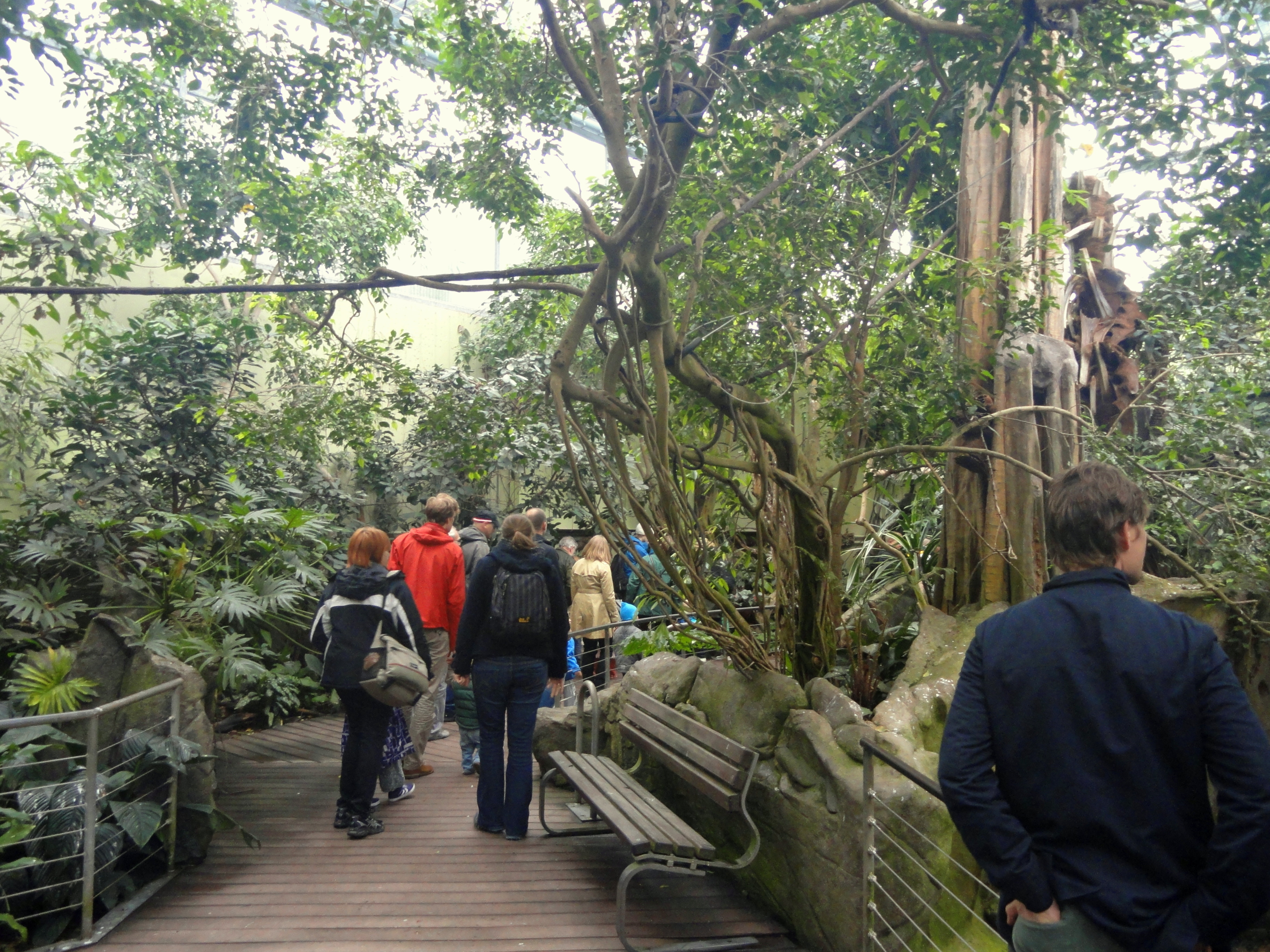 Copenhagen Zoo, Frederiksberg, Copenhagen, Denmark.